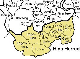 Hids Herred, Gl. Viborg Amt, Denmark. Map by Svend-Erik Christiansen.